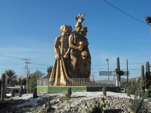 monumentos de Ímuris